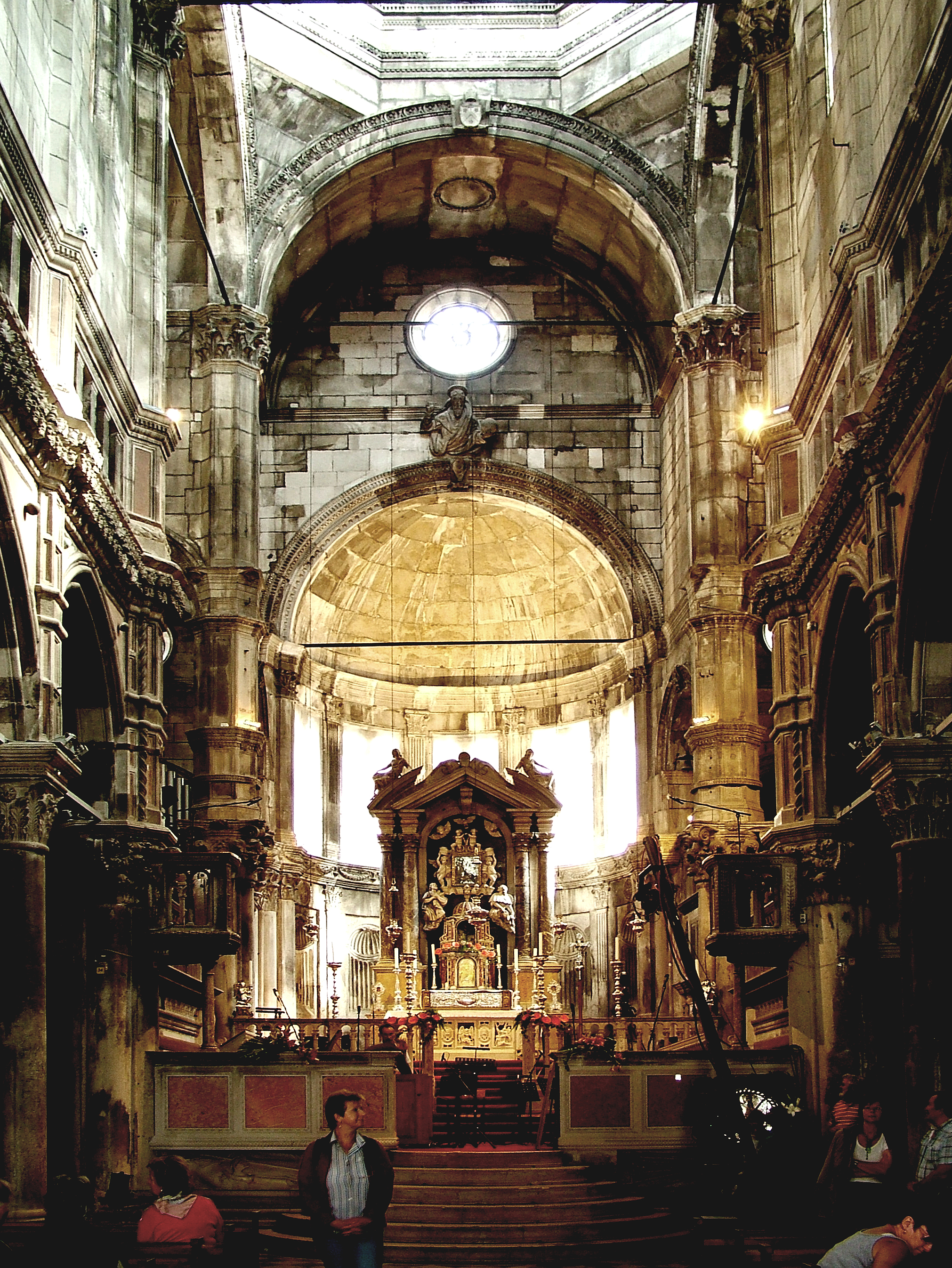 Sibenik: Székesegyház belső tér (Horvátország)